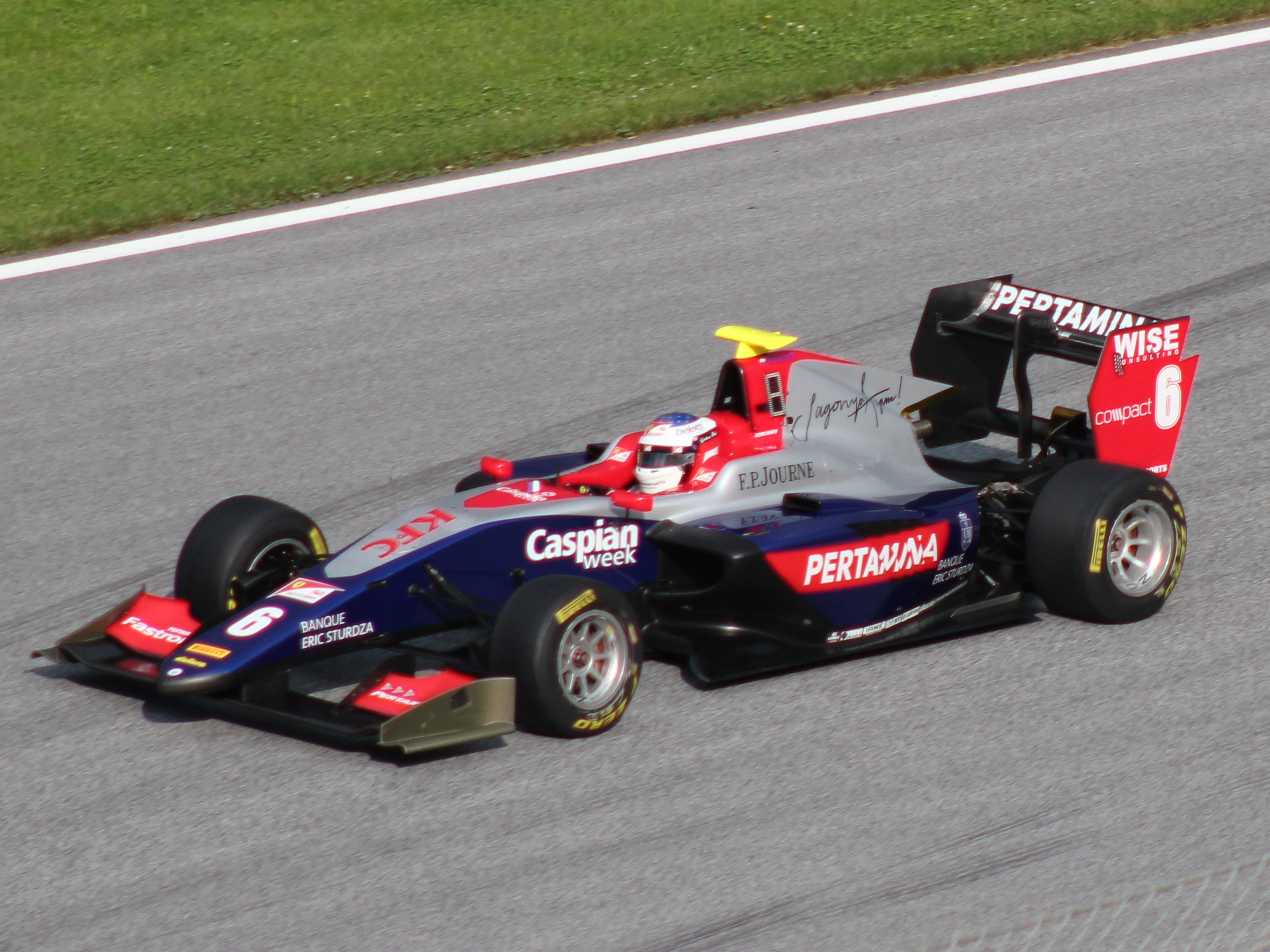 06 Giuliano Alesi beim Rennwochenende in Österreich 2018